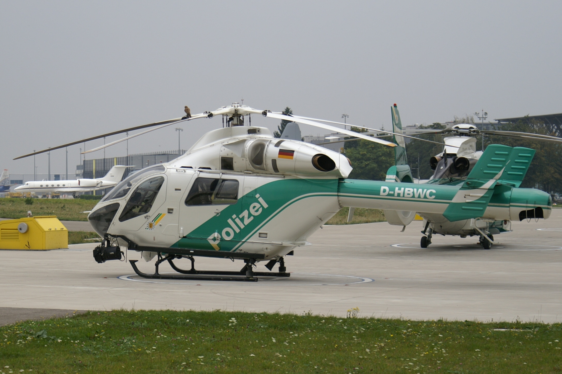 Polizei Baden-Württemberg MD 902 D-HBWC am Flughafen Stuttgart STR/EDDS